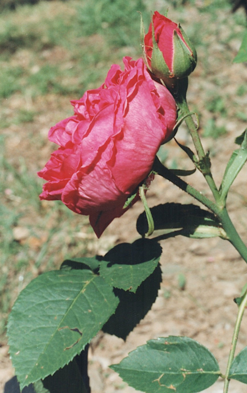 'Mlle Elise Chabrier' photo mai 1996 Victor E Gautreau